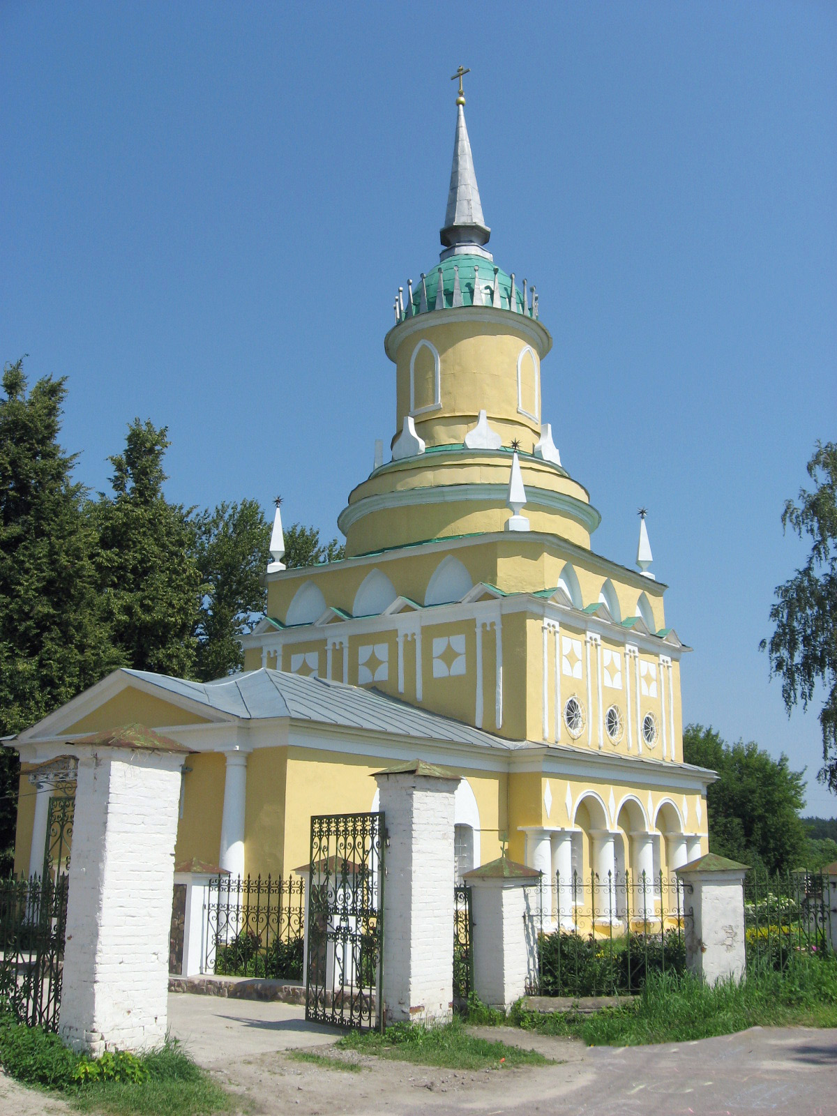 Храм в селе Черкизово Коломенского района